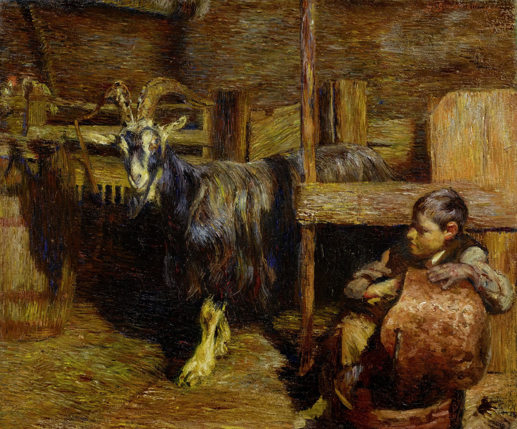 Im Ziegenstall. Öl auf Leinwand. Oben rechts signiert und datiert: G. Giacometti. 1896. 45 x 55 cm.